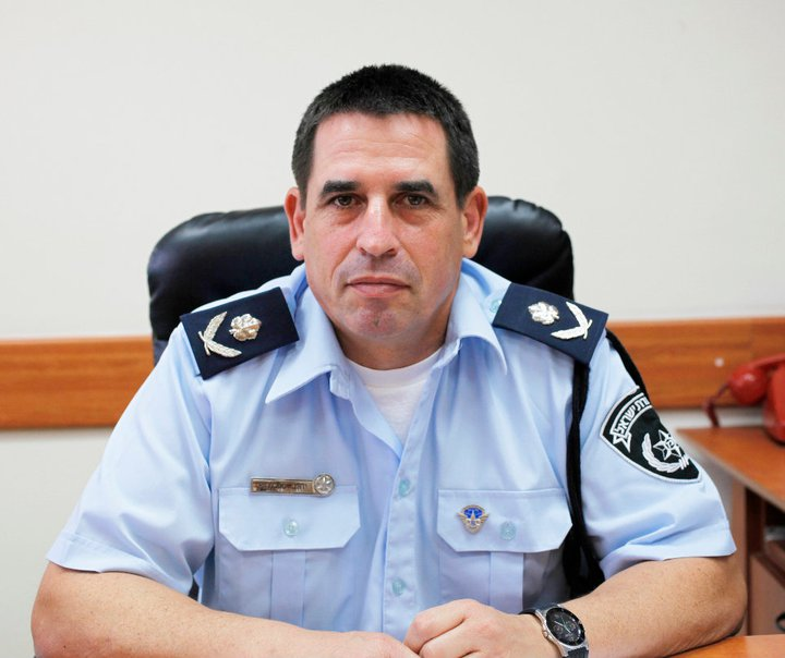 ניצב יואב סגלוביץ